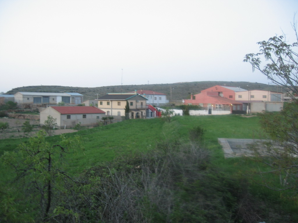 Casas de Paniza